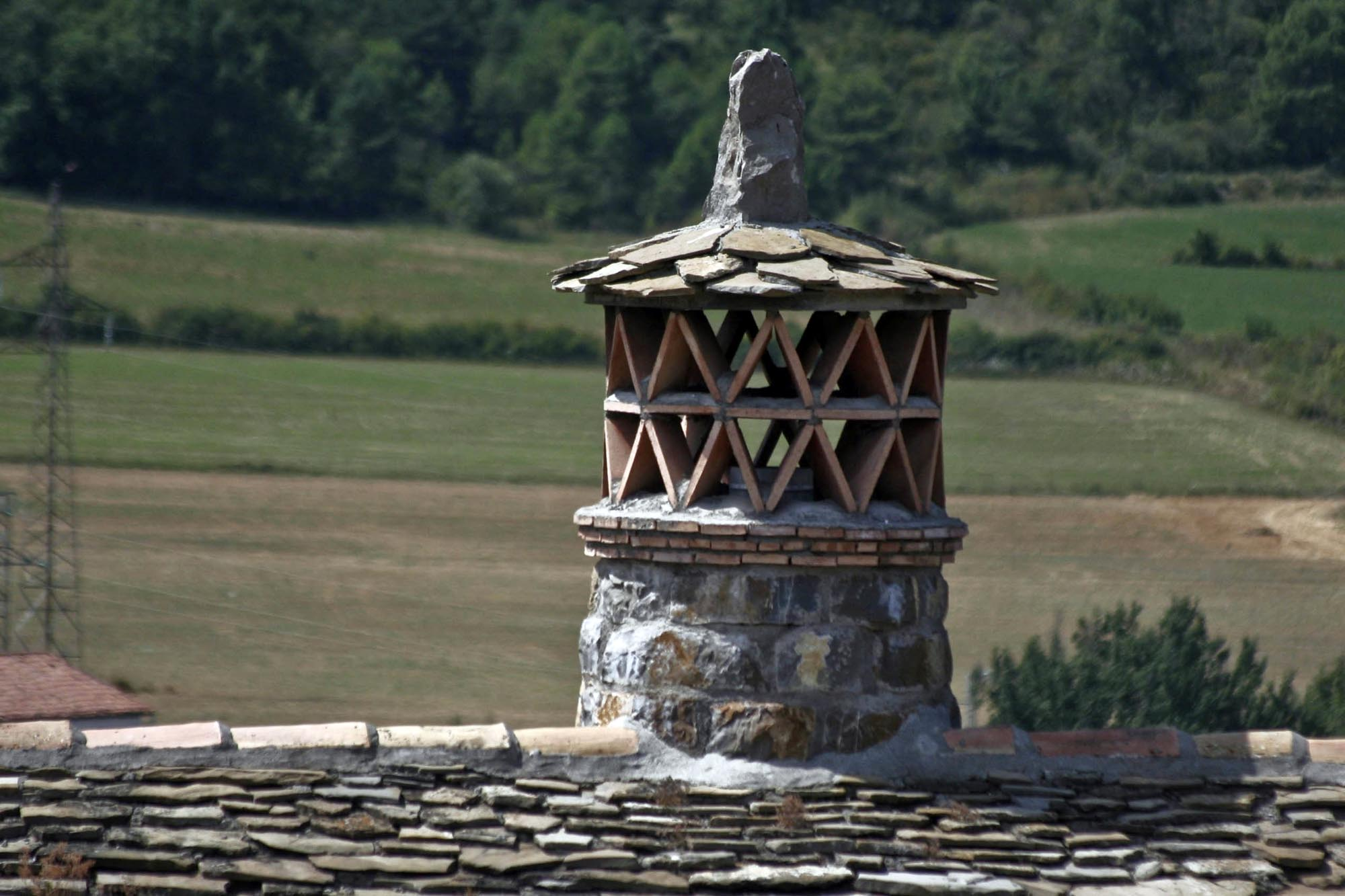 Souche de cheminée aragonaise à Ainsa-Sobrarbe, Huesca, Espagne